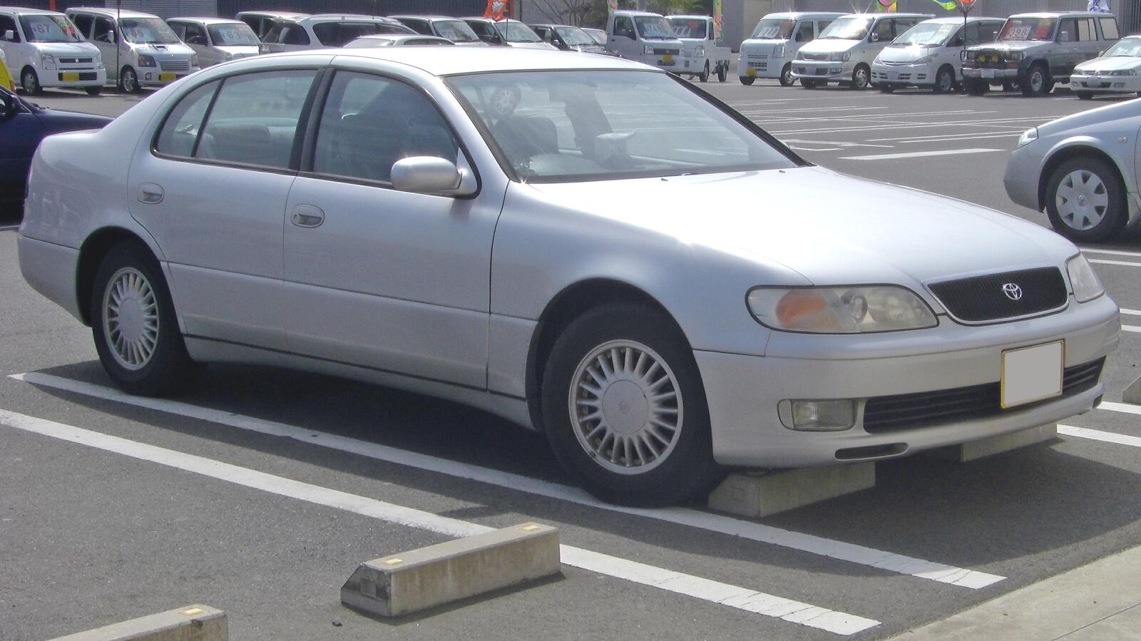 トヨタ・アリスト（初代）